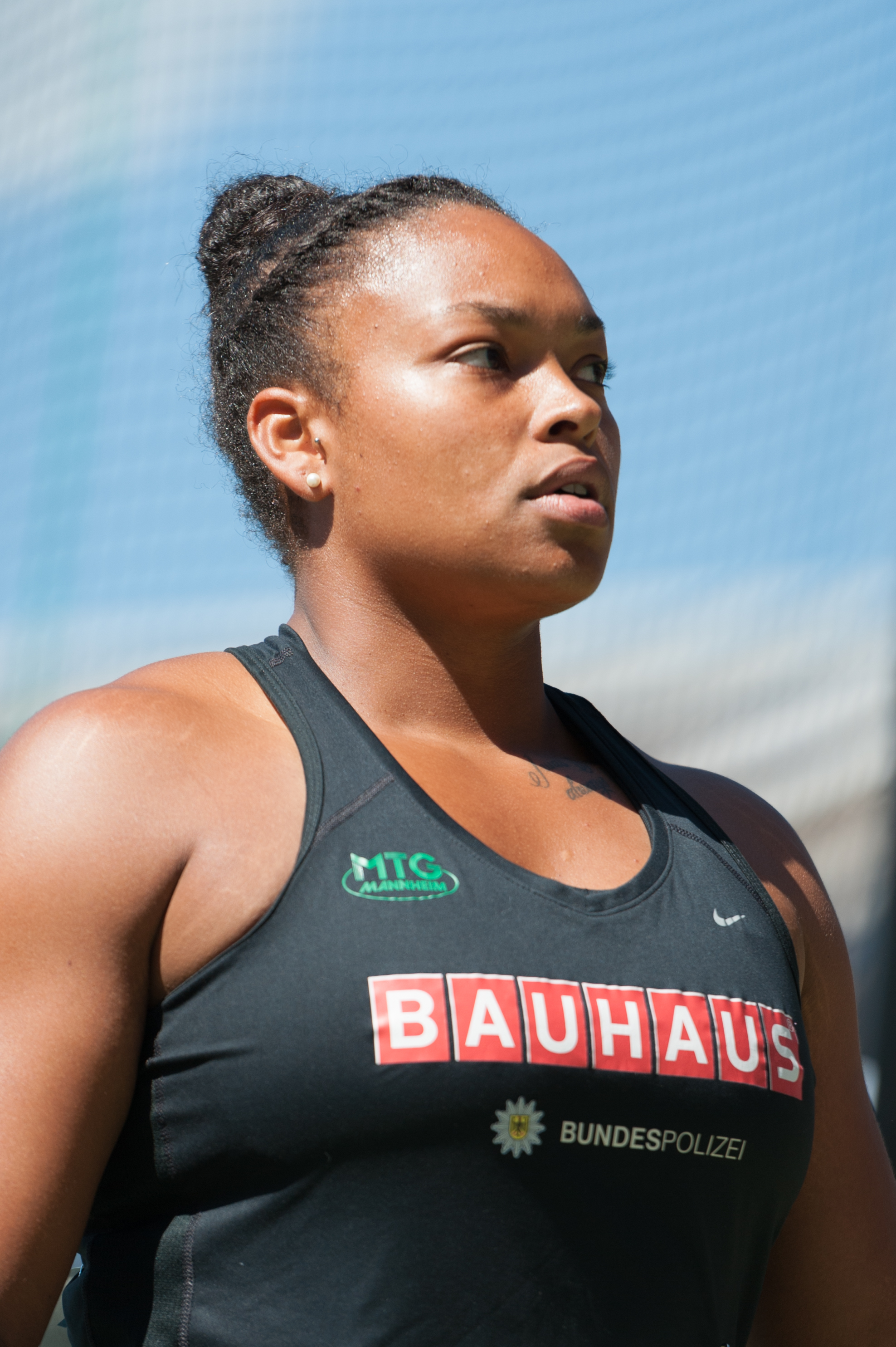 Deutsche Leichtathletik-Meisterschaften 2015: Frauen Diskuswurf - Shanice Craft, MTG Mannheim